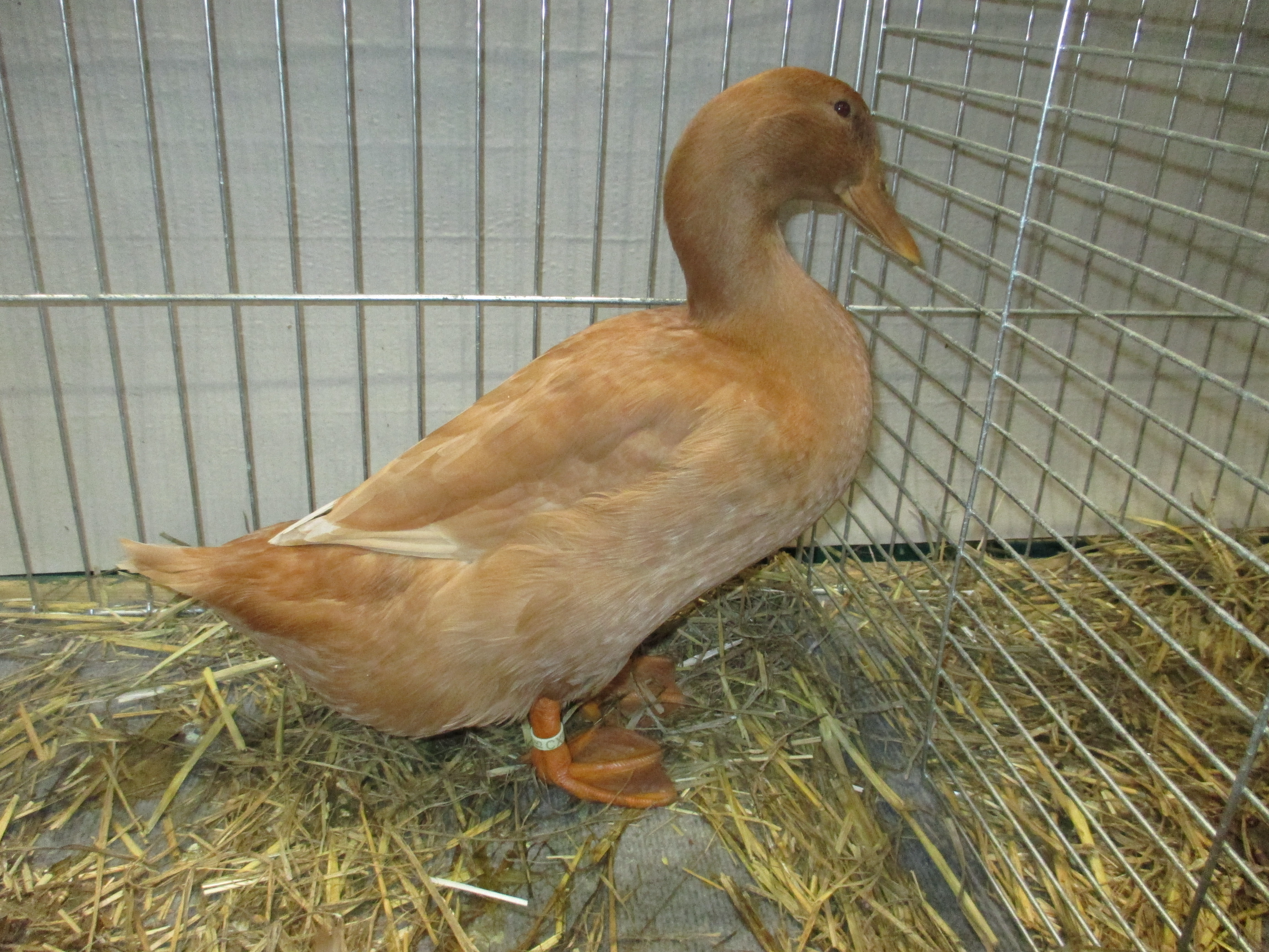 Orpingtonente